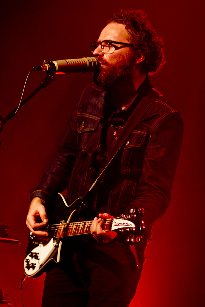 Mikael Simpson på Forbrændingen 9. marts 2013